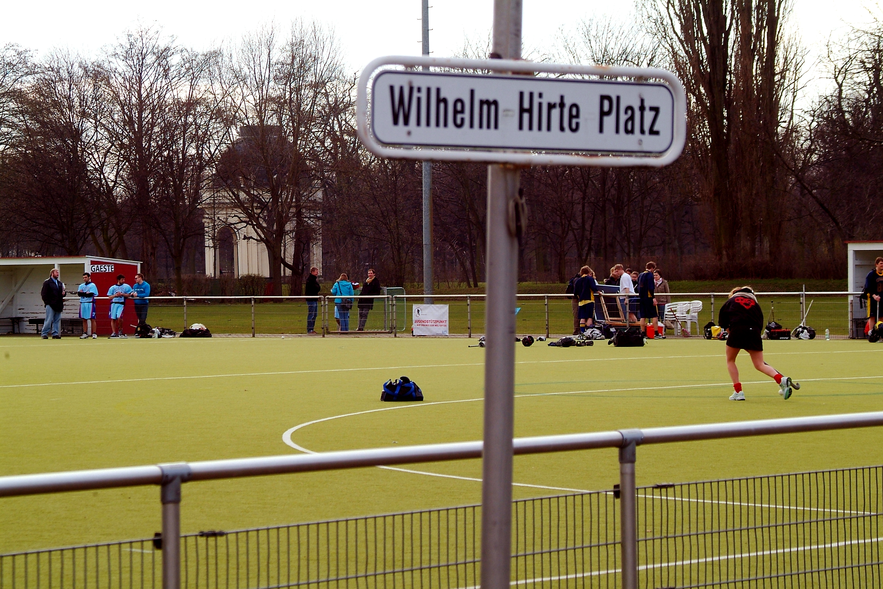 Hockey-Spiel auf dem Wilhelm Hirte Platz auf dem Gelände des Deutschen Hockey Clubs Hannover (DHC Hannover) nahe der Graft des Großen Gartens in Herrenhausen ...